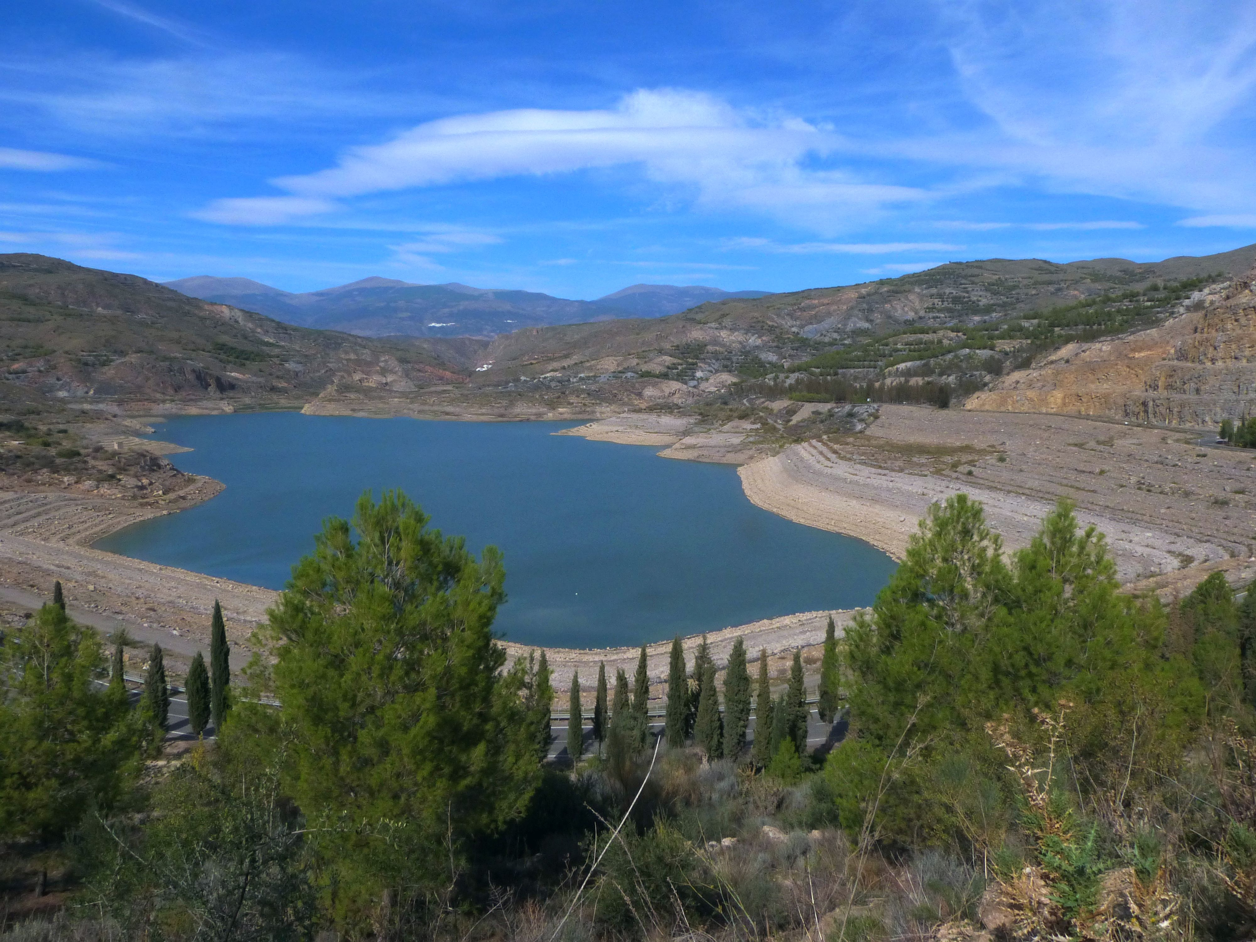 Béninar-Stausee